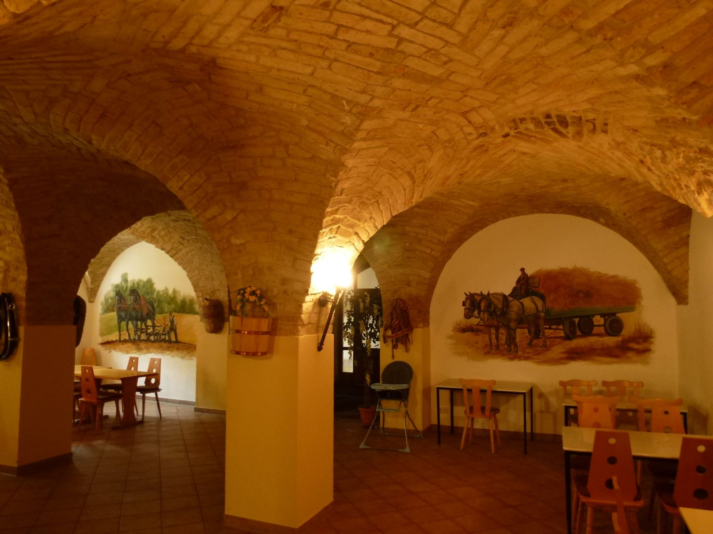 Kellergewölbe im Gutshaus Börln